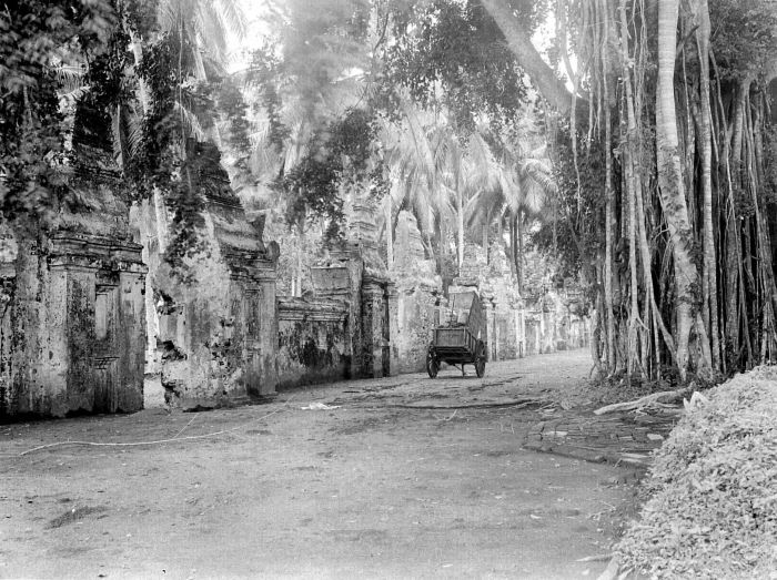 Negatief. De ruïne van het kraton Kaïbon